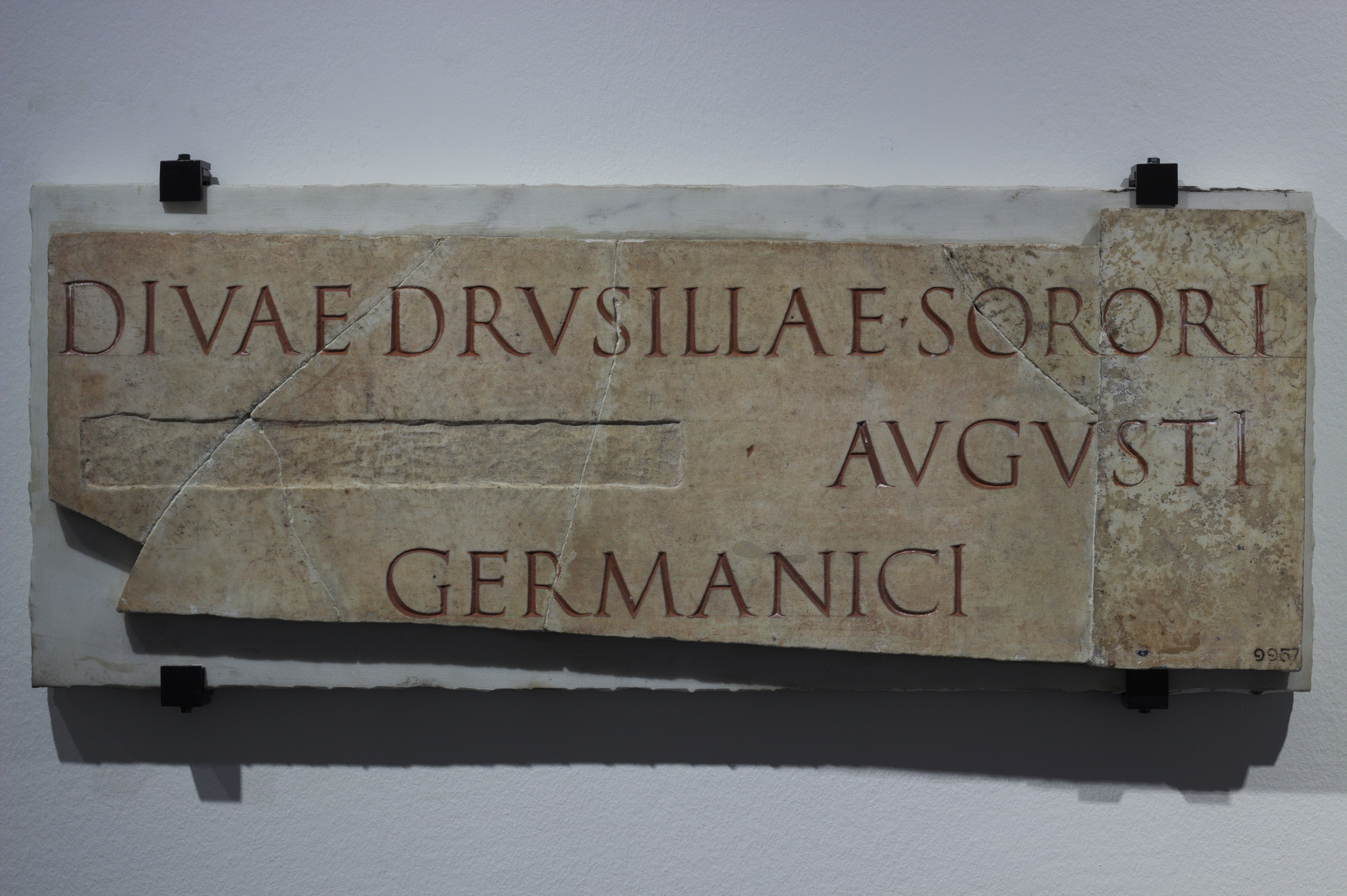 inscription découverte à Caere (Cerveteri) en Etrurie en 1846, dédiée à Drusilla à la soeur divinisée de Caligula, dont le nom Caius Augustus est martelé.